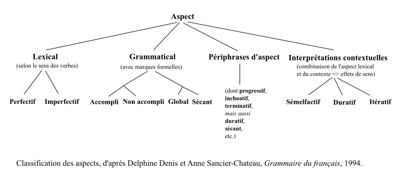 Classification des aspects, d'après Delphine Denis et Anne Sancier-Chateau, Grammaire du français, Le Livre de poche (Librairie générale française), Paris, 1994. ISBN 2 253 16005 9.